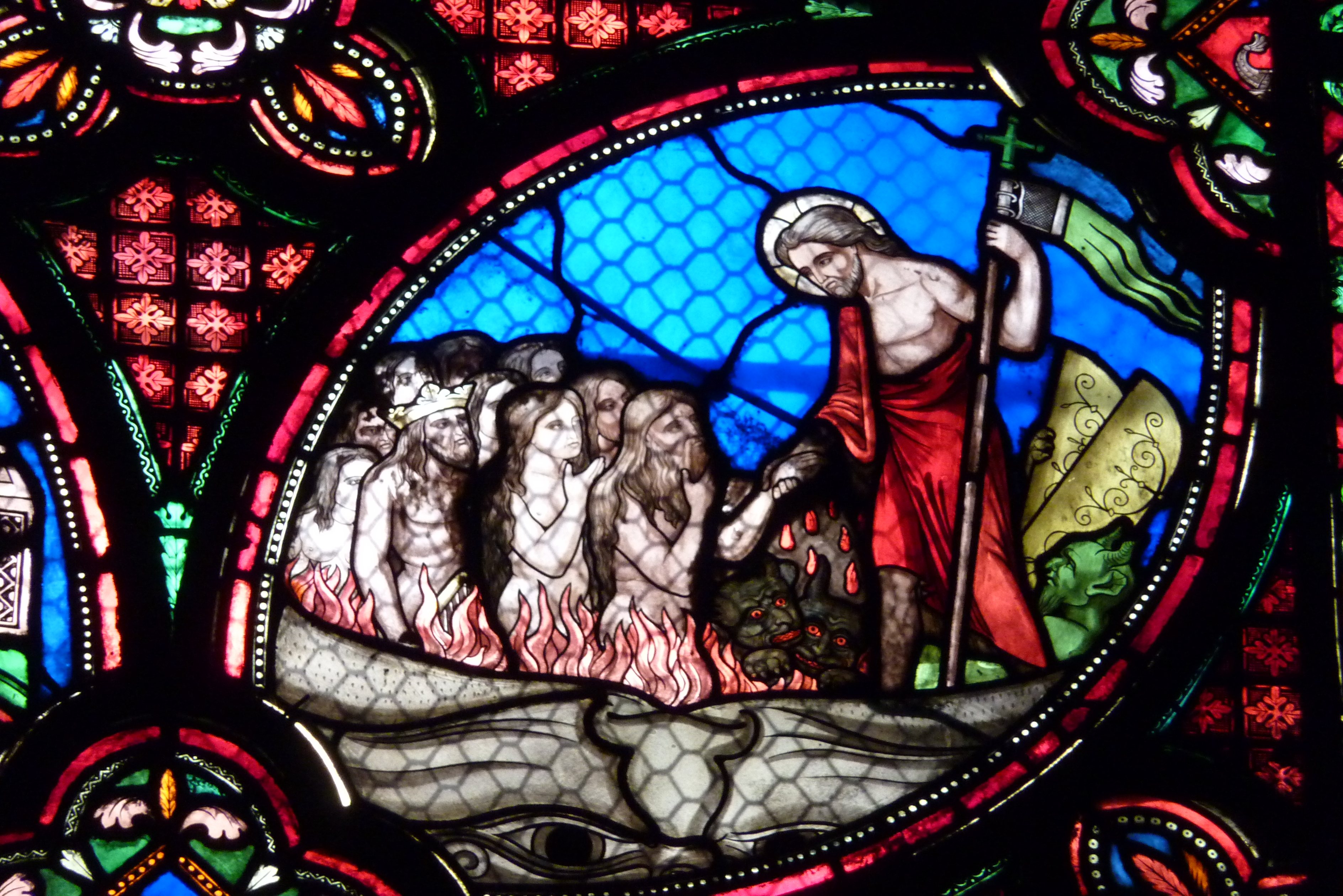 Detail eines Bleiglasfensters in der Kirche Saint-Germain-l'Auxerrois in Paris, Darstellung: Höllenfahrt Christi